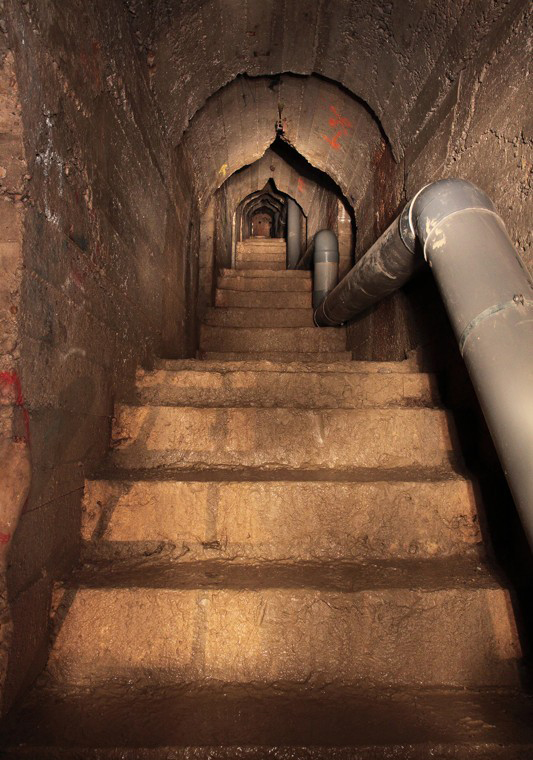 La "colonne vertébrale" supérieure